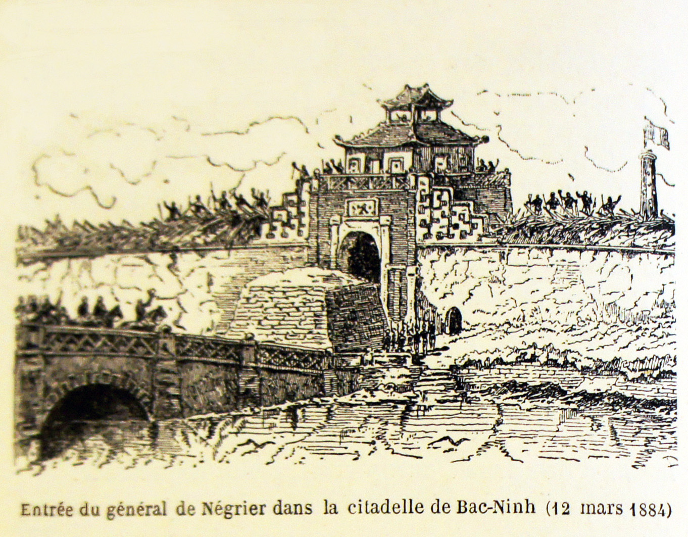 Citadelle_de_Bac-Ninh_prise le 12_III_1884 .